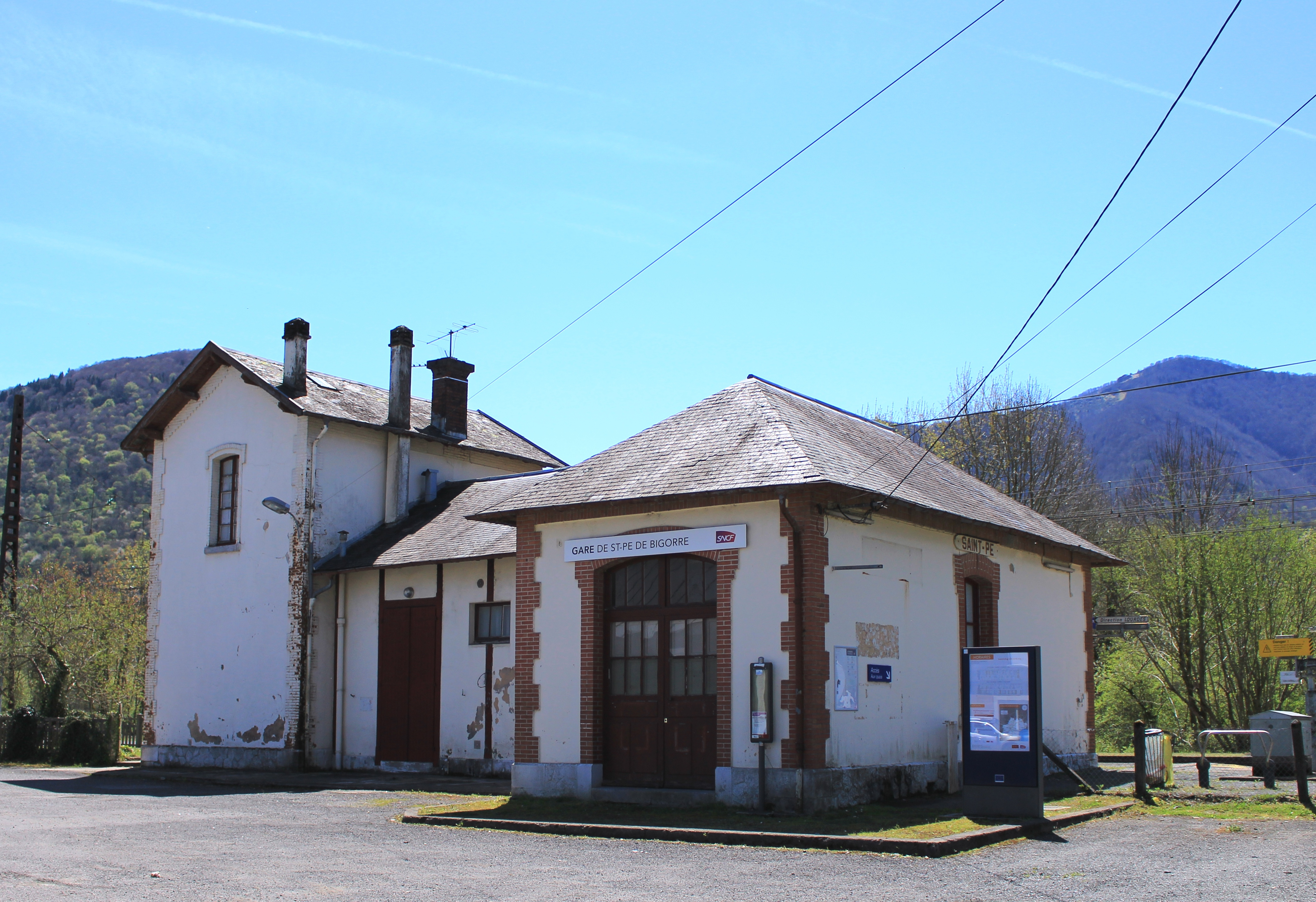 Gare de Saint-Pé-de-Bigorre (Hautes-Pyrénées)